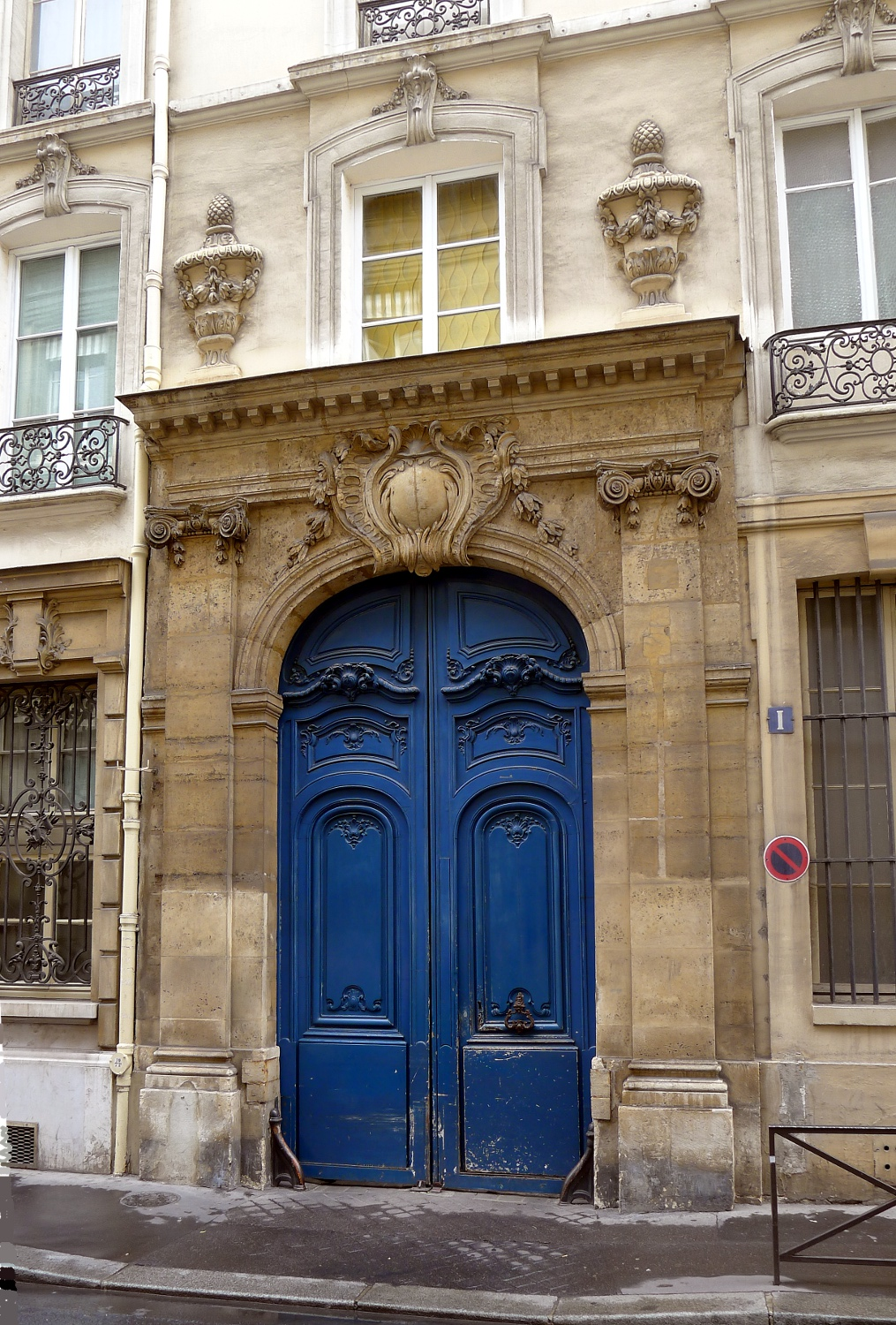 Rue de Lille, n°1 - Paris VII